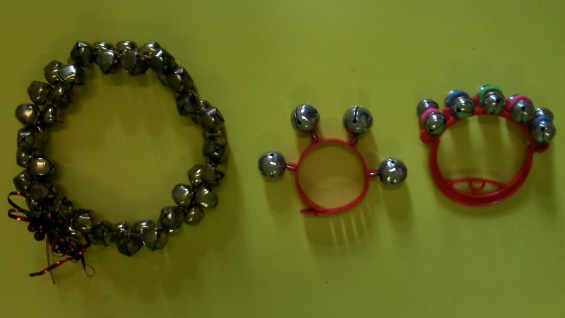 普及型的馬鈴。